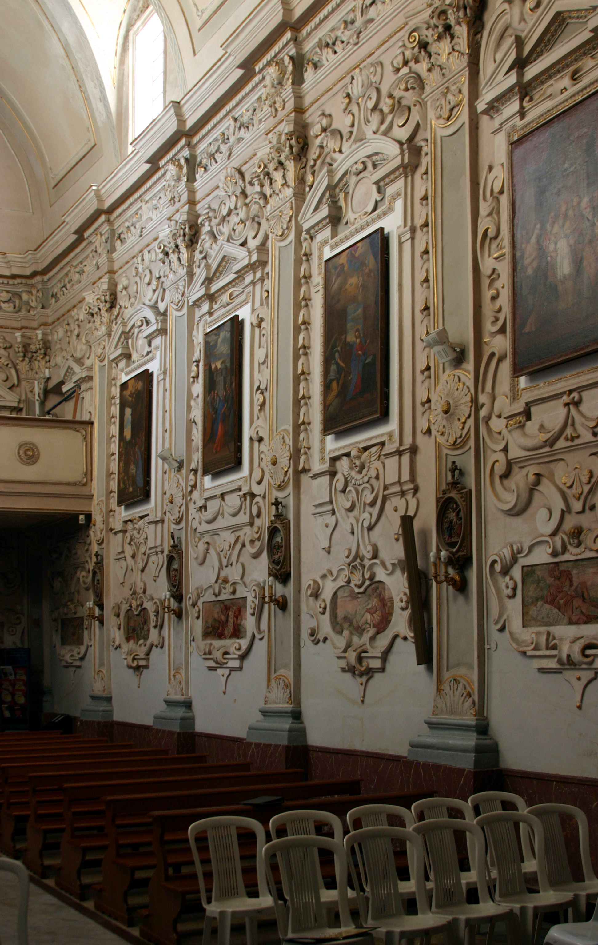 San Giuseppe - Taormina